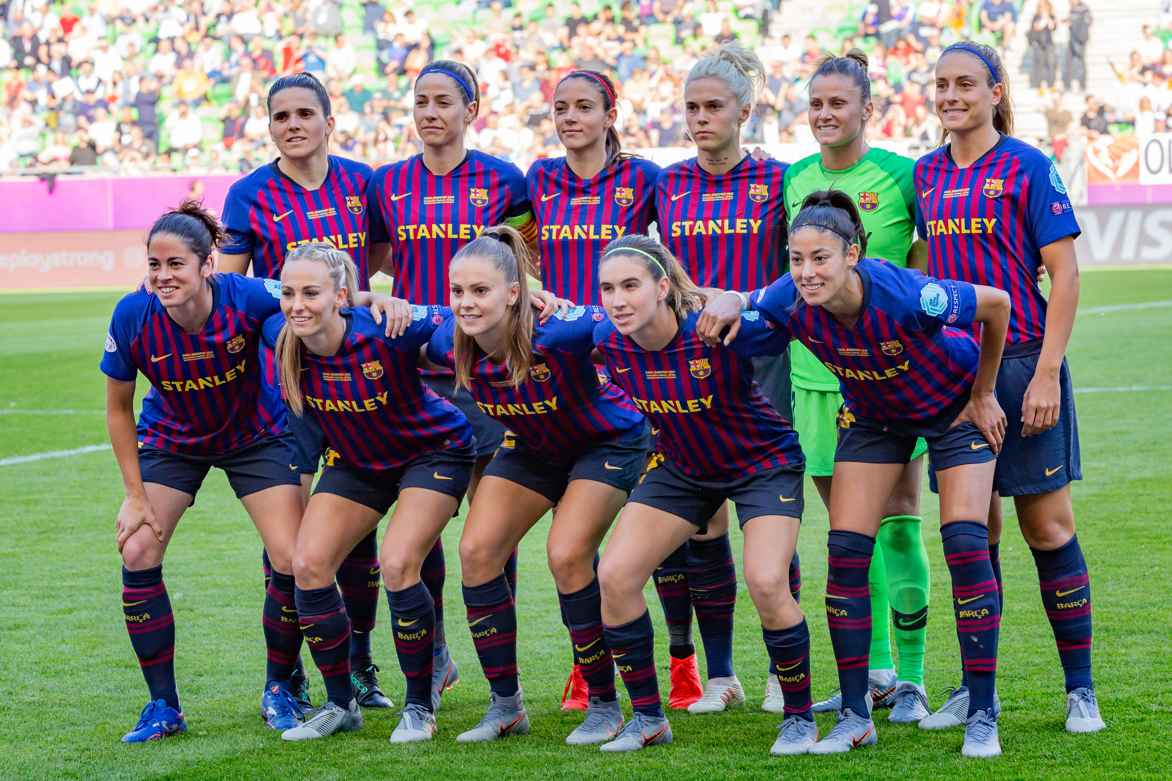 Fußball, Frauen, UEFA Women's Champions League, Olympique Lyonnais - FC Barcelona; Mannschaftsfoto, Aufstellung, team photo FC Barcelona